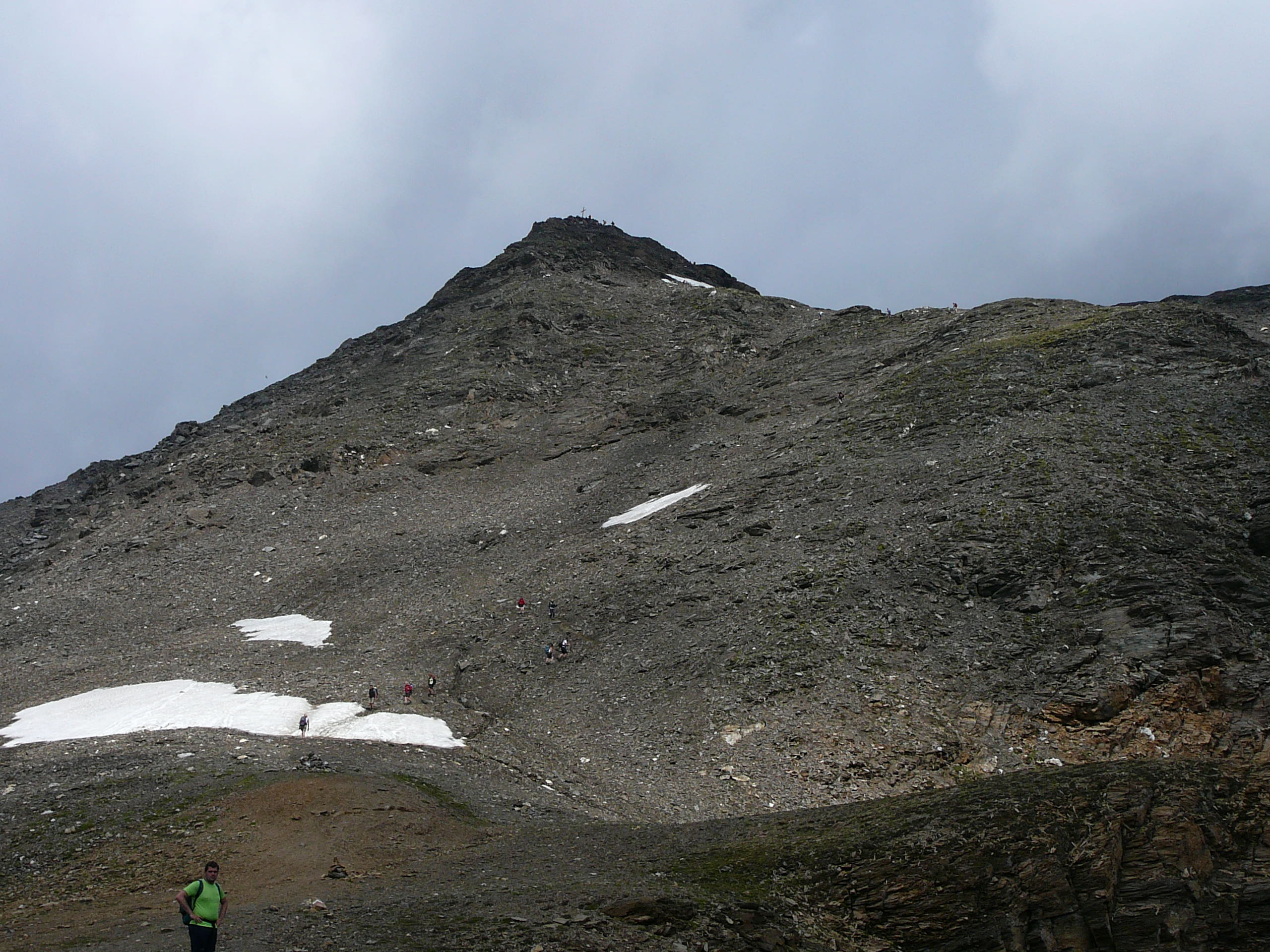 Salita al Picco della Croce